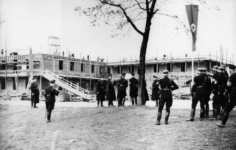 Dachau, Konzentrationslager, Besuch Himmlers Schutzhaftlager Dachau.- Stab Himmlers bei der Besichtigung eines Kasernenbaus der SS in Dachau.